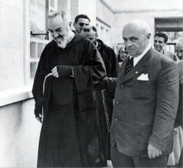 Il medico italiano Guglielmo Sanguinetti con Padre pio